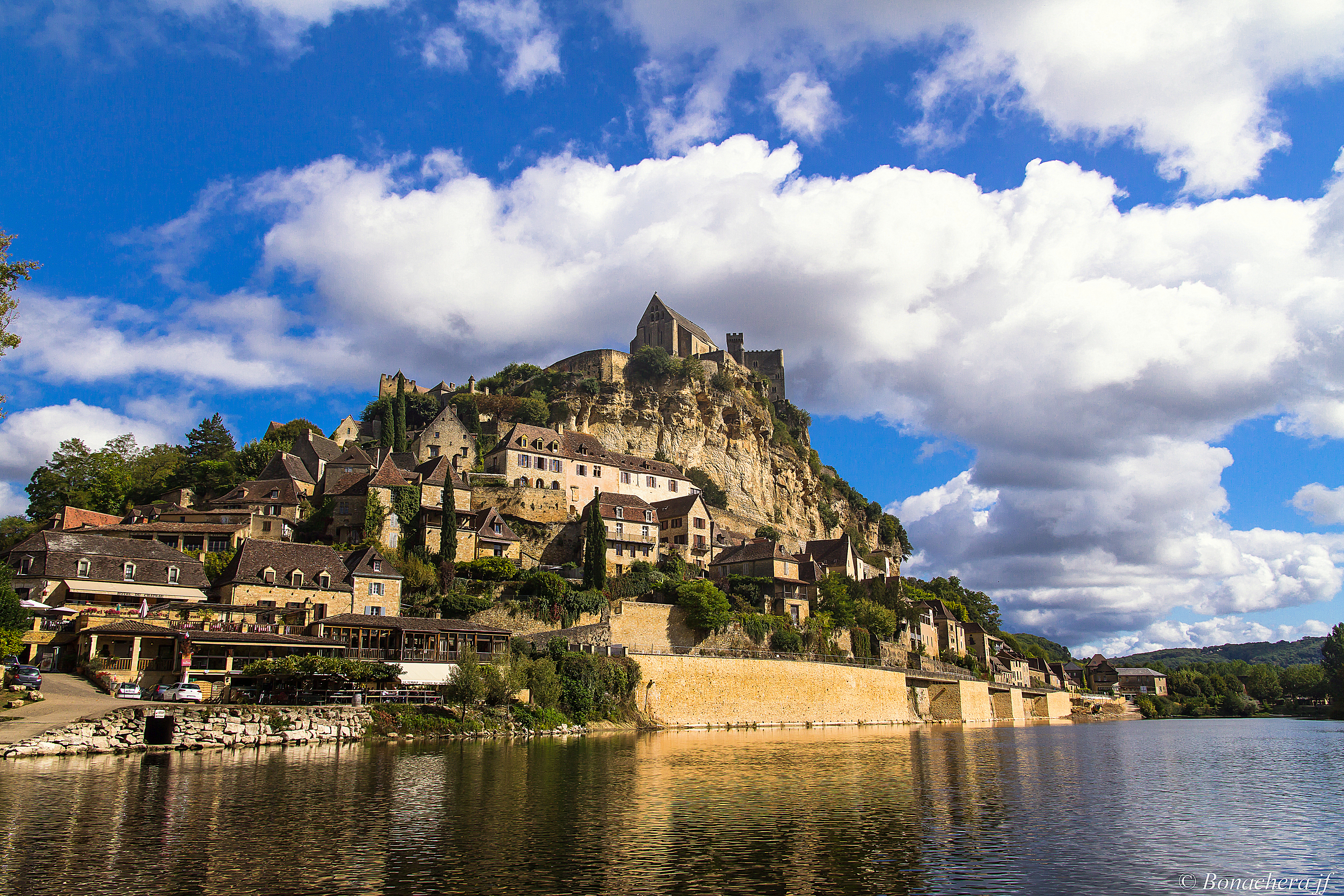 le village de Beynac vue depuis le fleuve